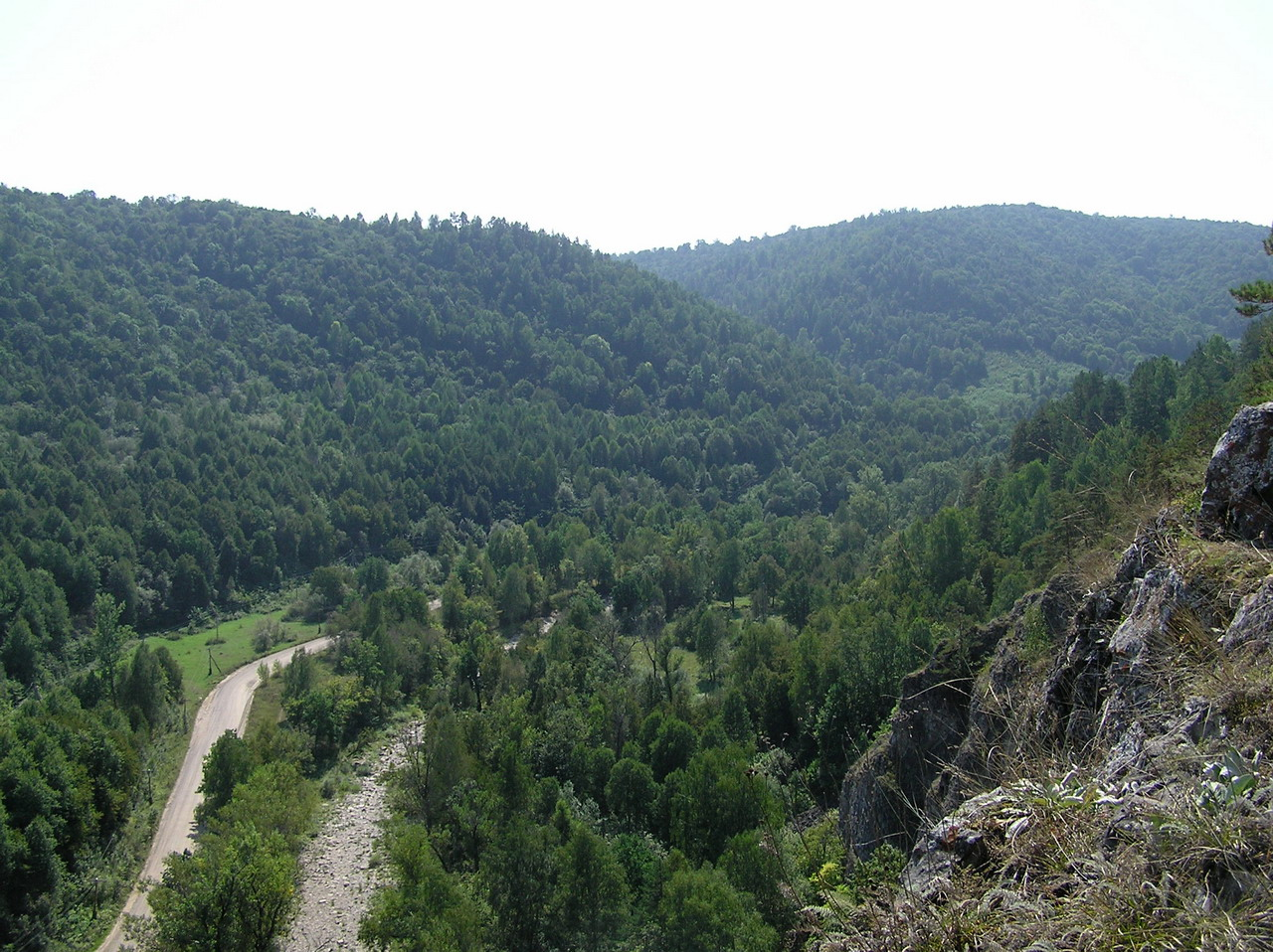 Макарово Вид с горы над п.Салавата